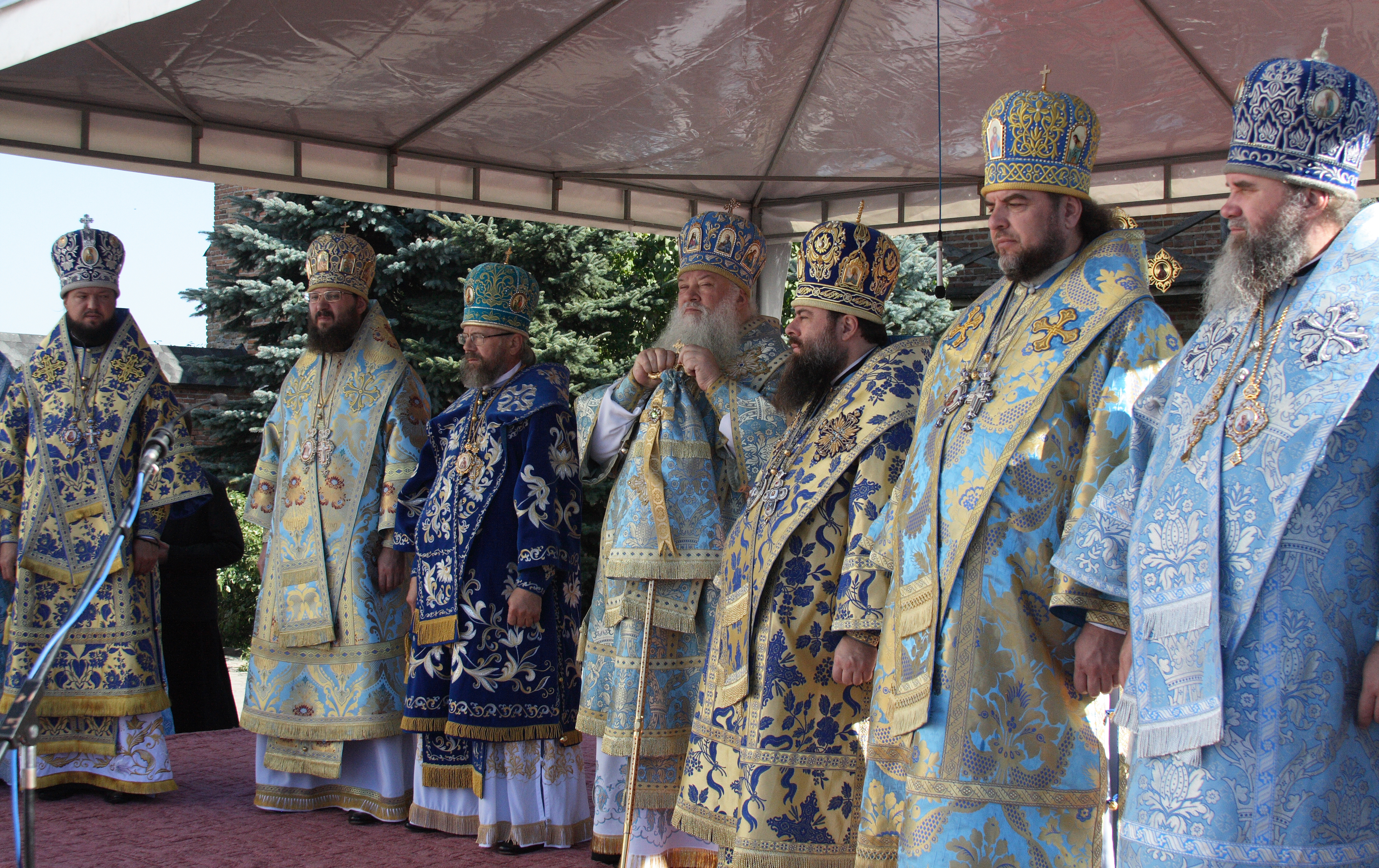 Архиереи Украинской православной церкви (Московского патриархата), слева направо: Никодим (Горенко), Антоний (Паканич), Августин (Маркевич), Нифонт (Солодуха), Митрофан (Юрчук), Симеон (Шостацкий), Феодор (Мамасуев)